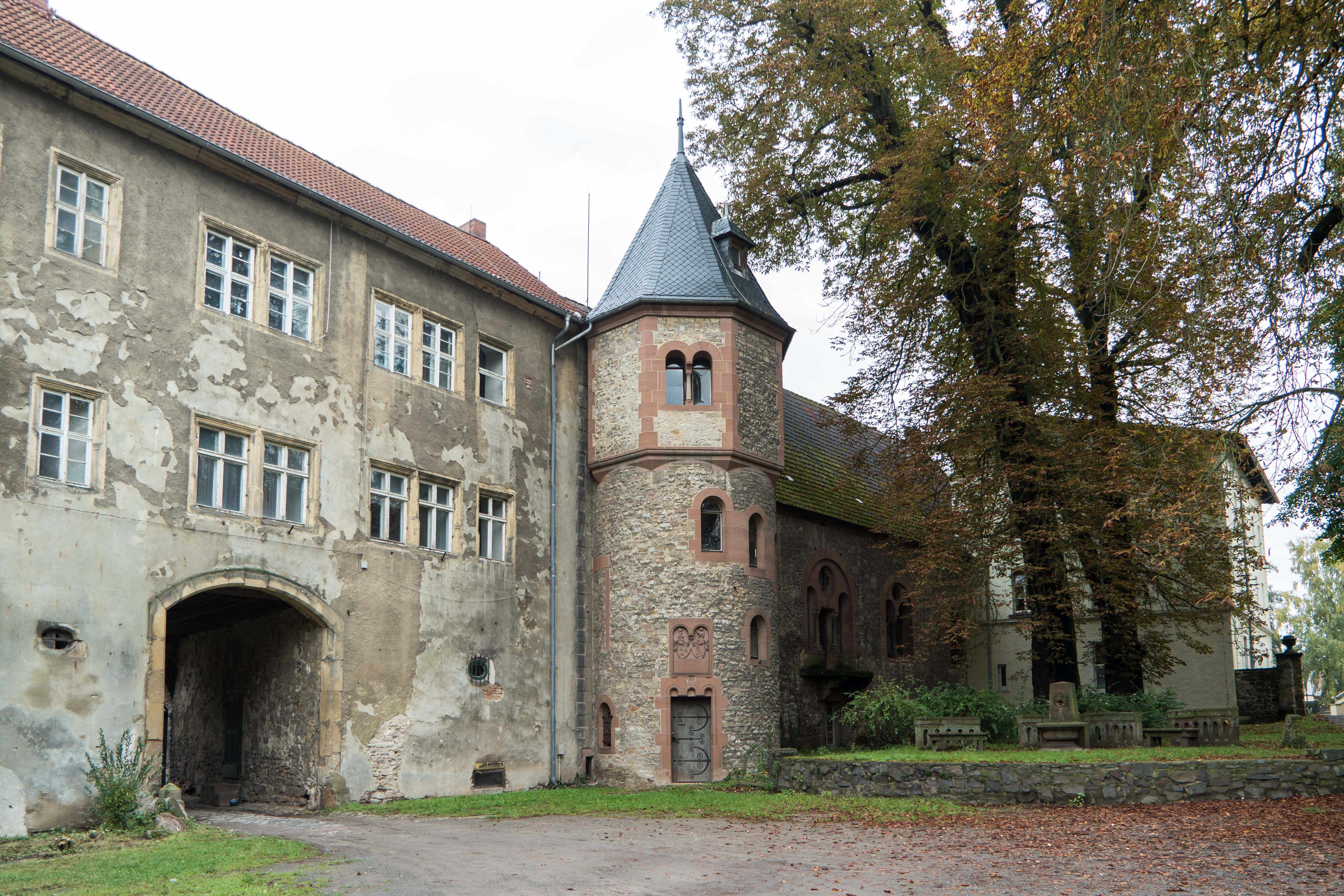 Schloss Erxleben Treppenturm und Zufahrt zum Schlosshof